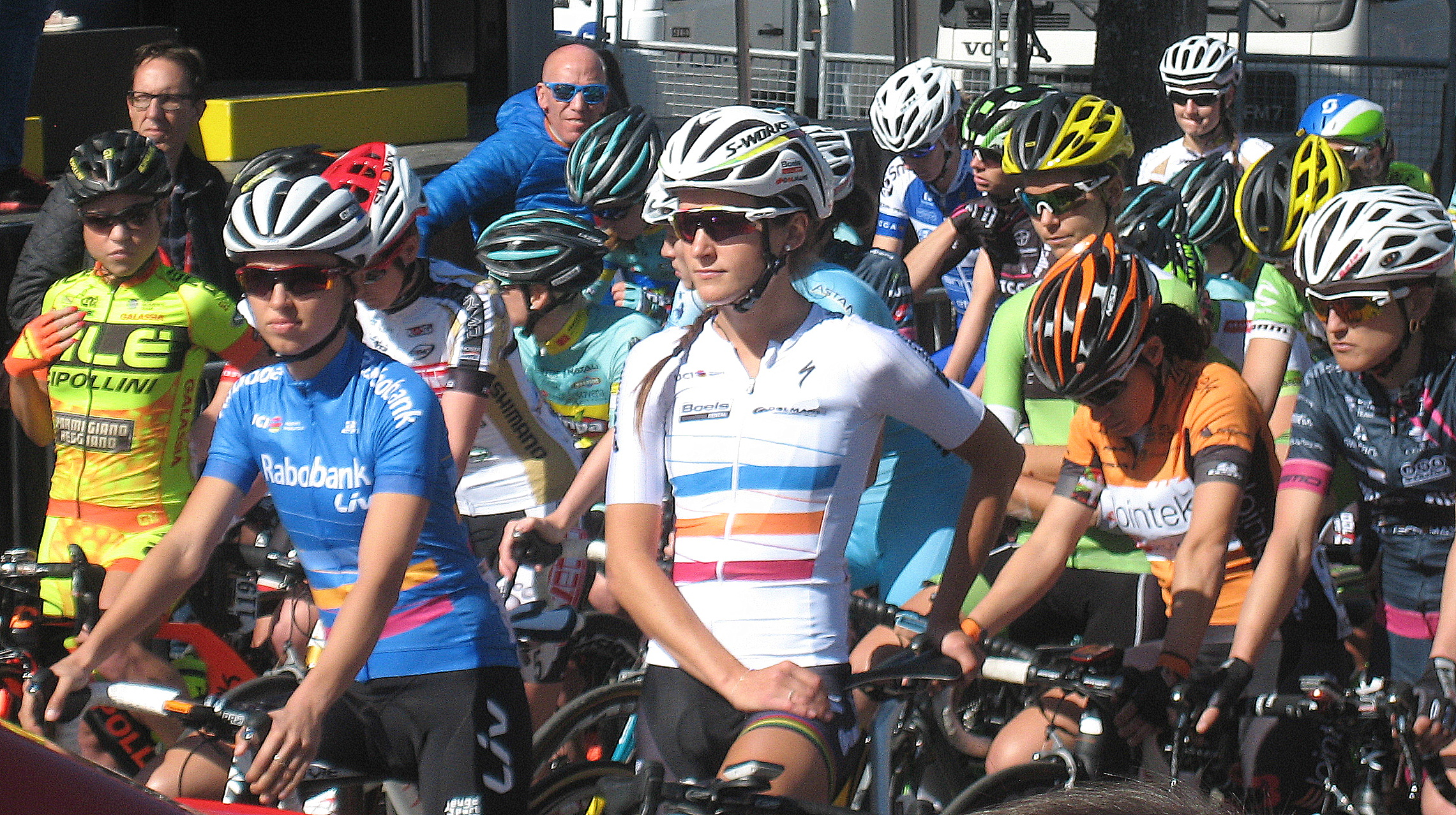 World Tour-leiders Niewiadoma en Armitstead aan start Waalse Pijl 2016